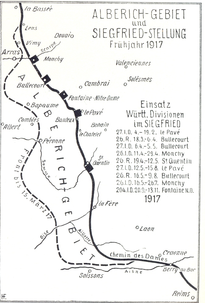 Karte seite 74: ALBERICH-Gebiet und SIEGFRIED-Stellung Frühjahr 1917